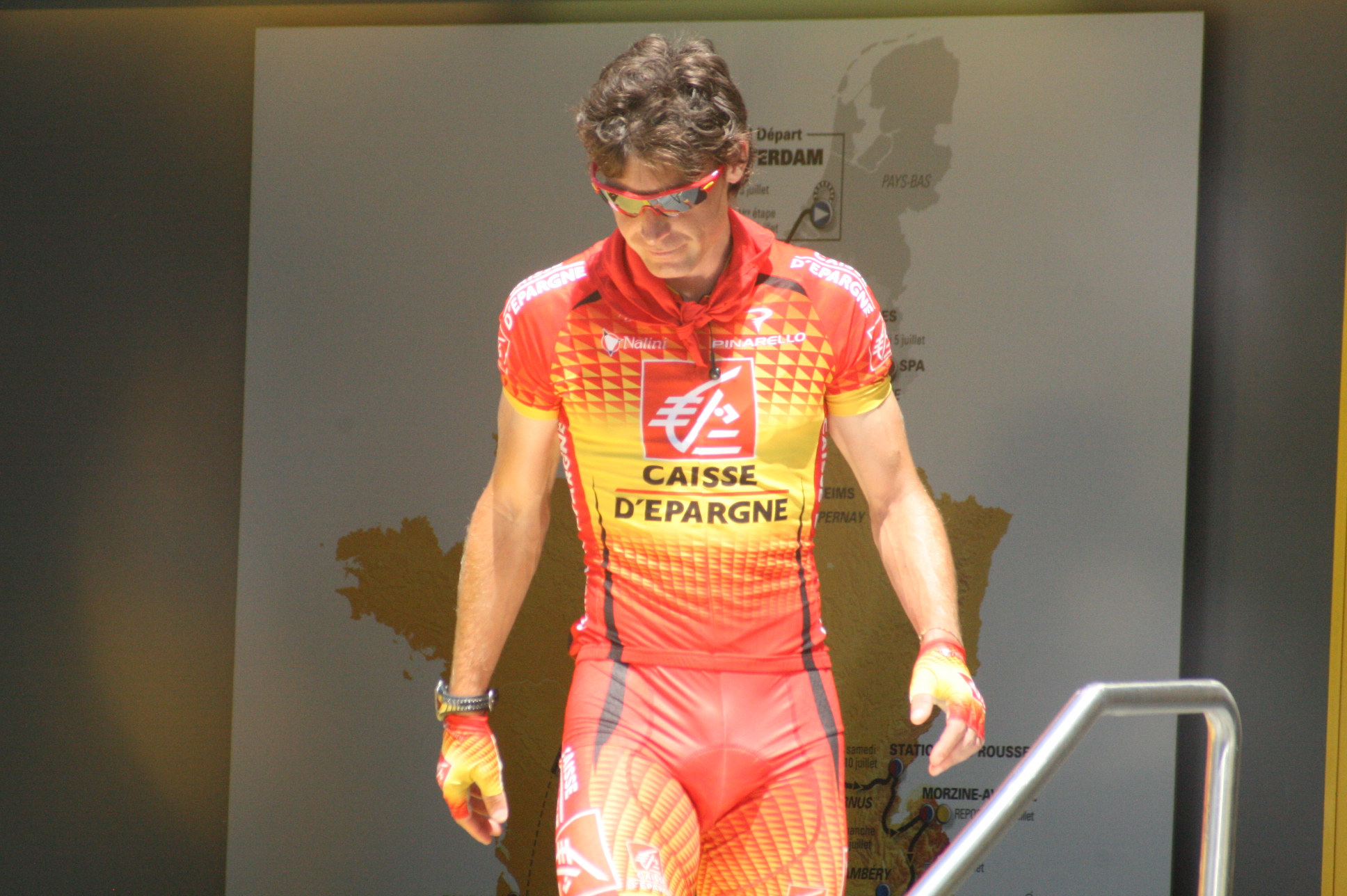 Départ de la 4e étape du Tour de France 2010 à Cambrai -José Ivan Gutierrez